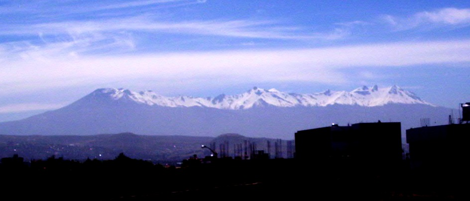 Volcán Pichu-pichu visto desde Cerro Colorado-Arequipa